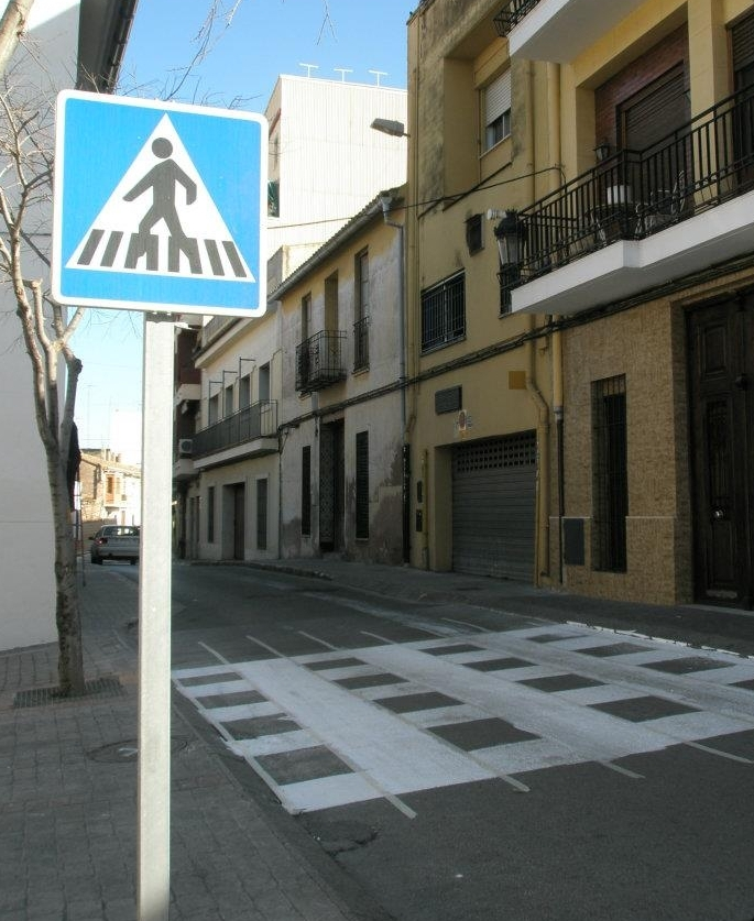 Paso de cebra mal pintado en Godella, Valencia, España.